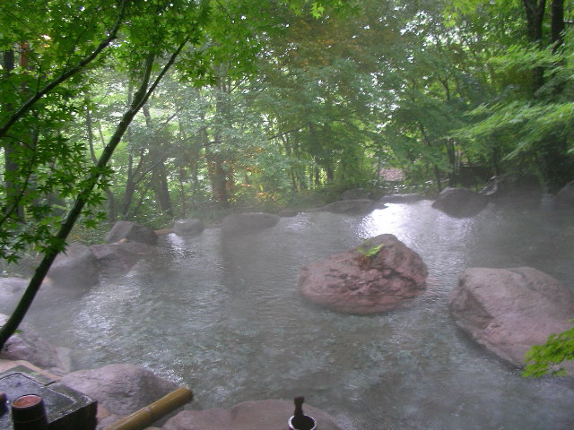 Onsen (Japanese hot spring)